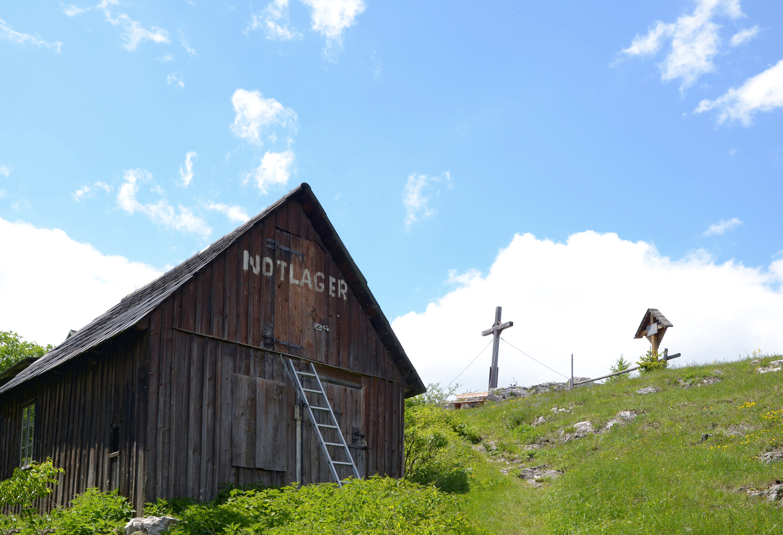 Niederösterreich, Gemeinde Miesenbach, Dürre Wand, Plattenstein, Notlager an der Gauermann-Hütte